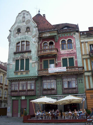 Brück Palace, str. Mercy 9, Piata Unirii, Timisoara, Romania (László Székely, 1910). Imagine oferita de autor, Nicoleta Chiru